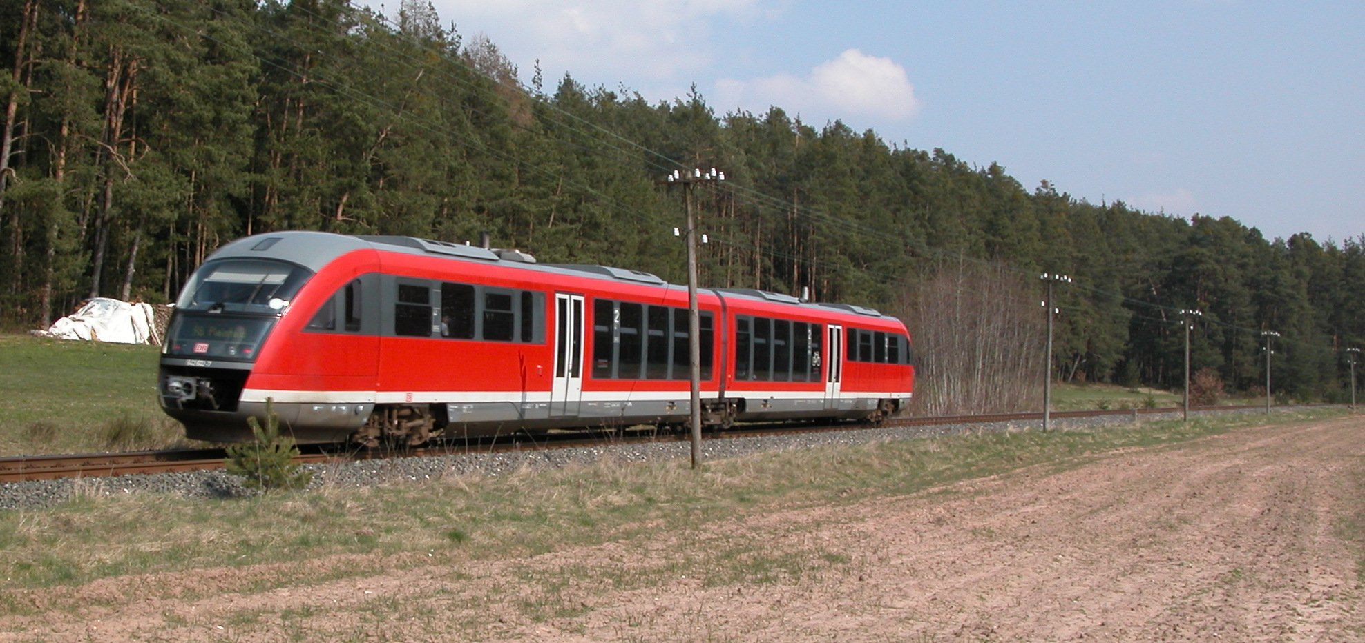 642 an der Strecke Pleinfeld-Gunzenhausen (mit Telegrafenmasten)